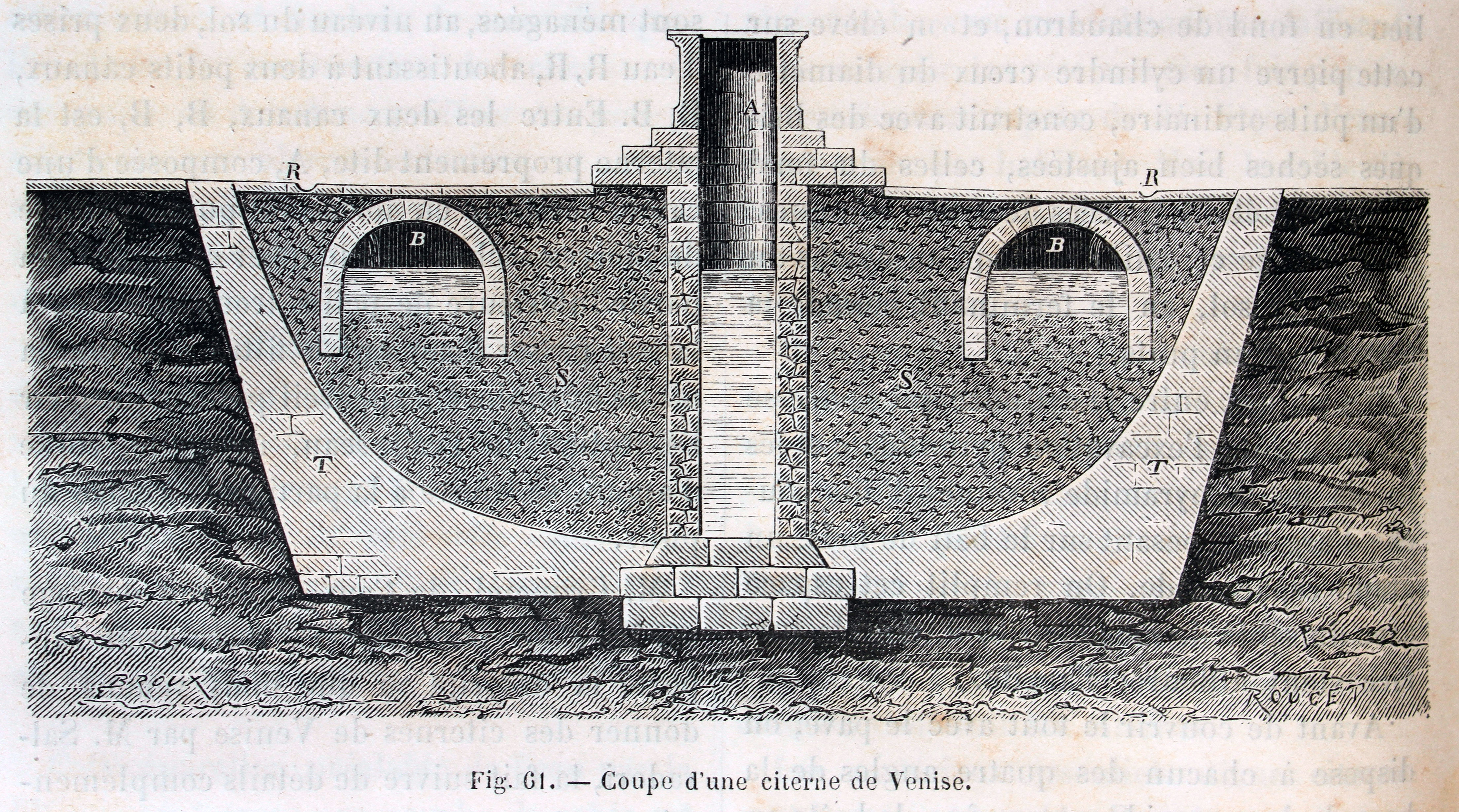 Ilustraciones de la obra : Les merveilles de l'industrie ou, Description des principales industries modernes / par Louis Figuier. - Paris : Furne, Jouvet, [1873-1877]. - Tome III